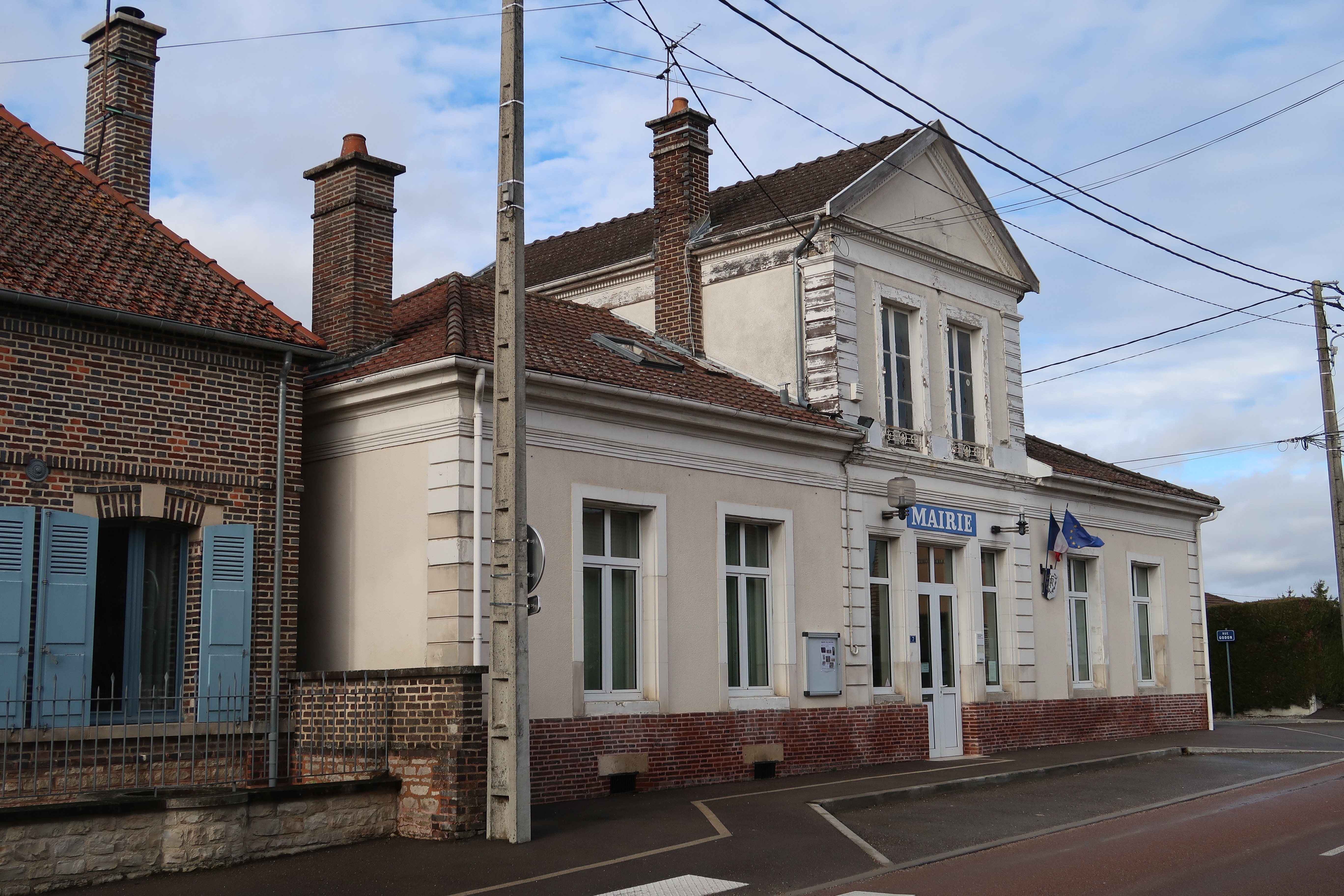 Saint-Benoît-sur-Seine, mairie